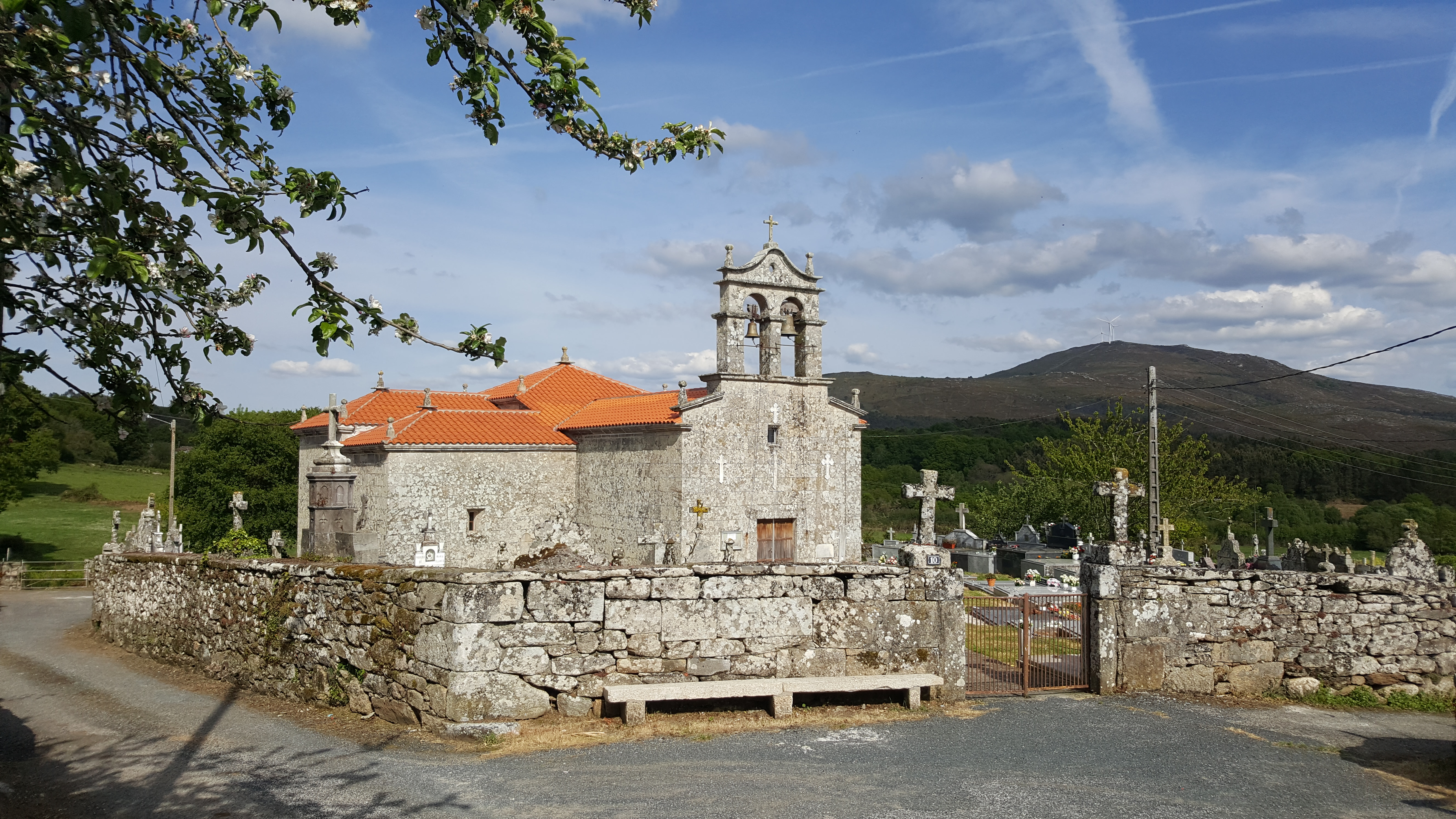 Igrexa parroquial de San Mamede de As Trabancas (Agolada). Ao fondo pode verse o monte Farelo.